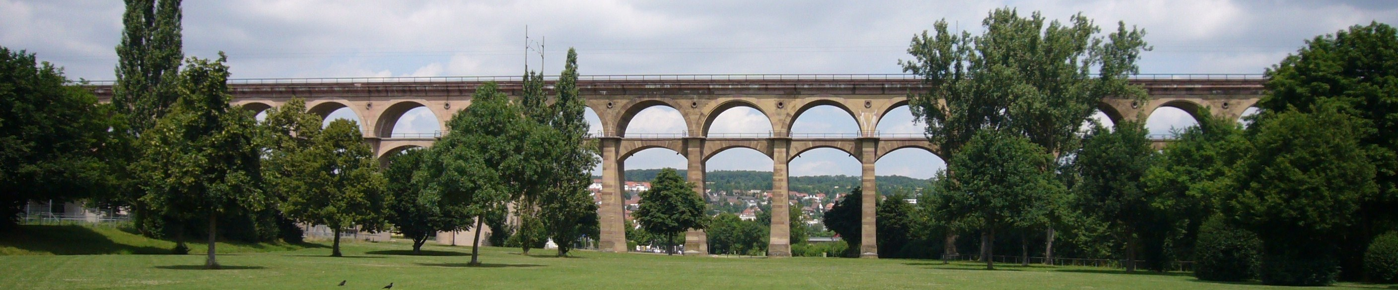 Der Bietigheimer Eisenbahnviadukt